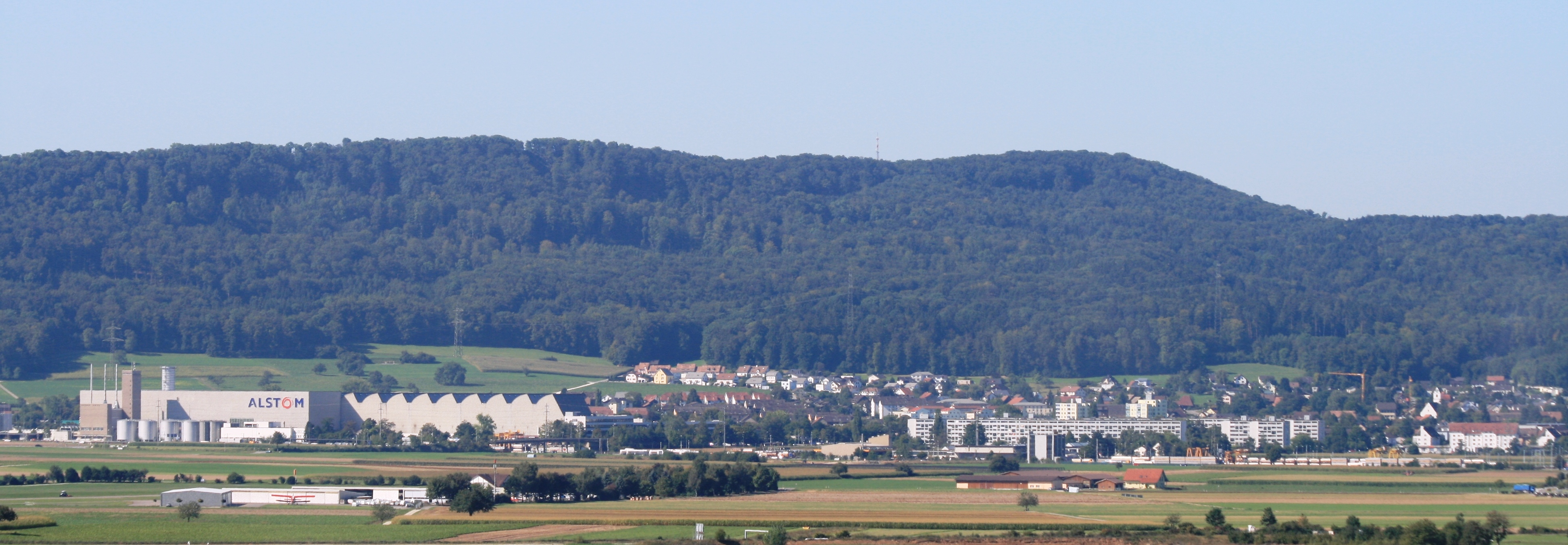 Birr, Aargau, Schweiz